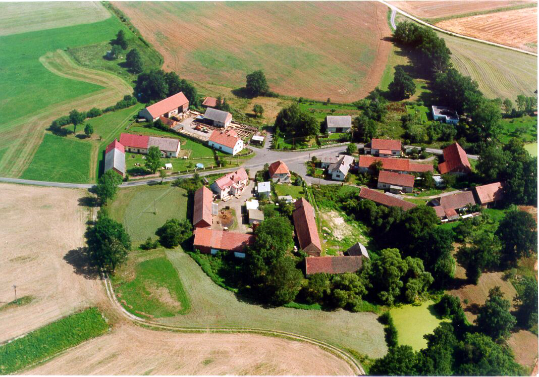 Namnice, letecký pohled 1